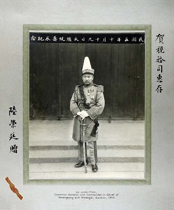 陸榮廷（1856年－1927年）